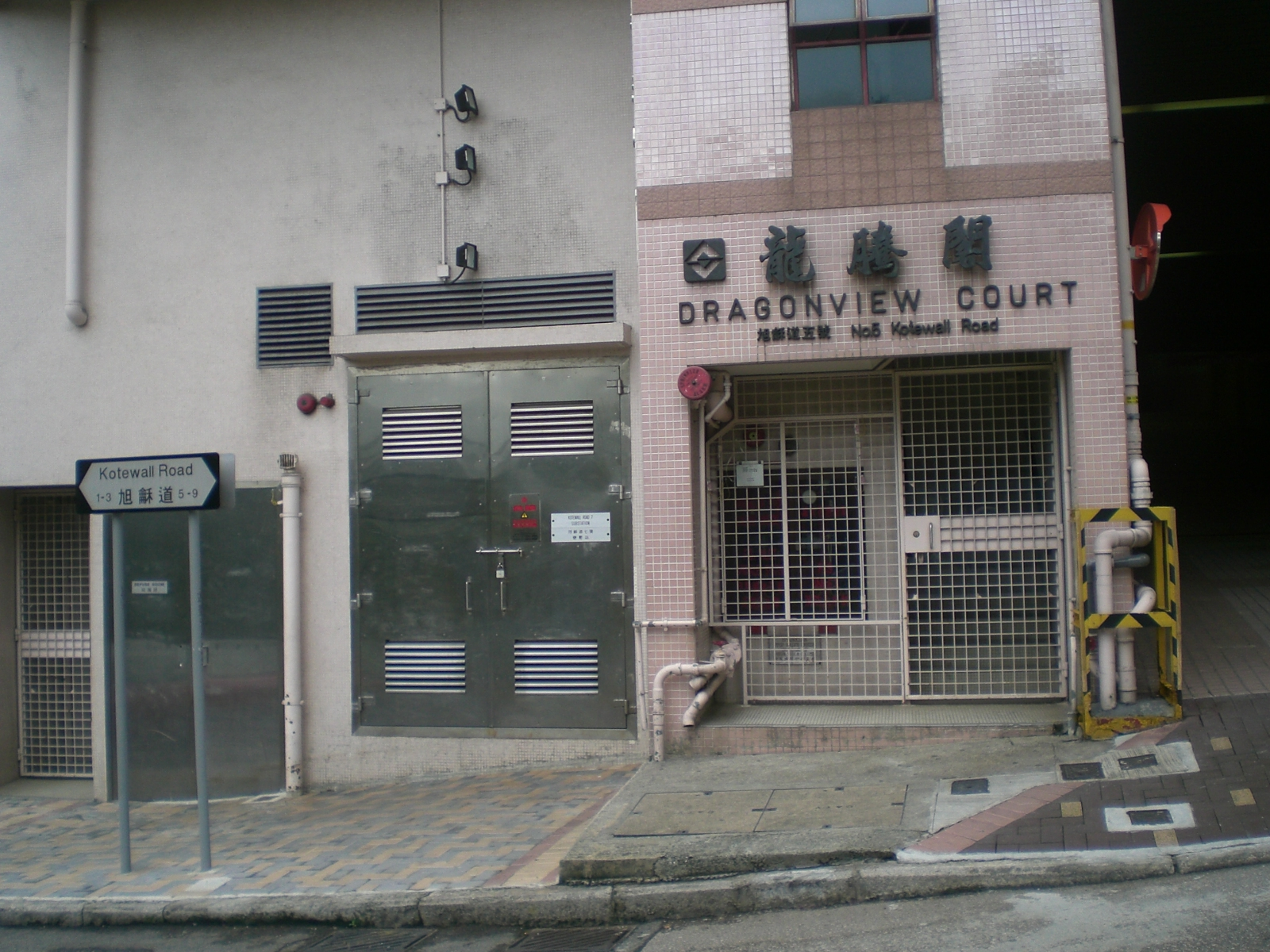 旭龢道, Kotewall Road, Hong Kong.